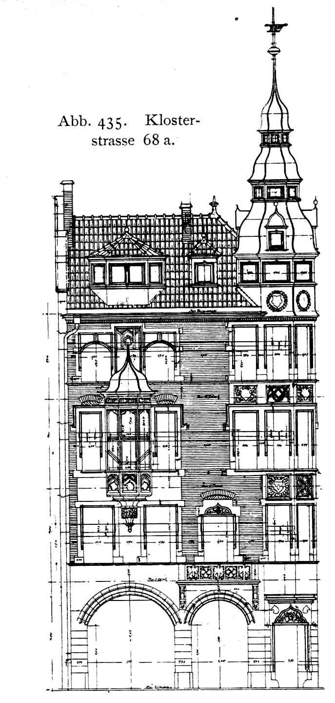 Eckhaus Klosterstraße 68a, Ecke Oststraße in Düsseldorf, erbaut 1898, Architekt Peter Paul Fuchs, Bauherr Ludwig Kraus.jpg